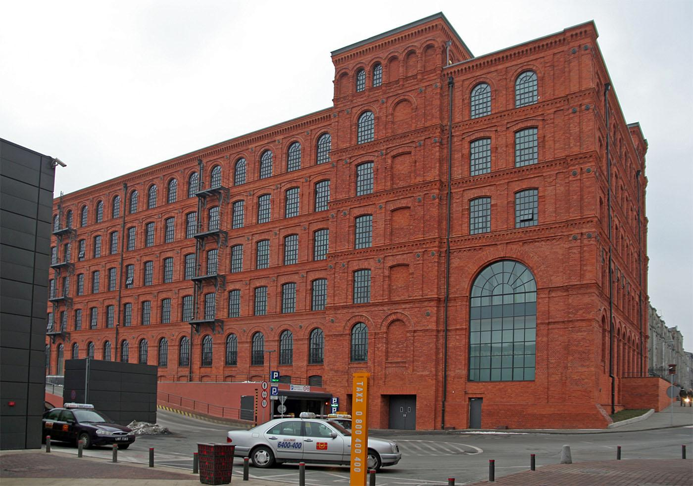 Hotel Andels